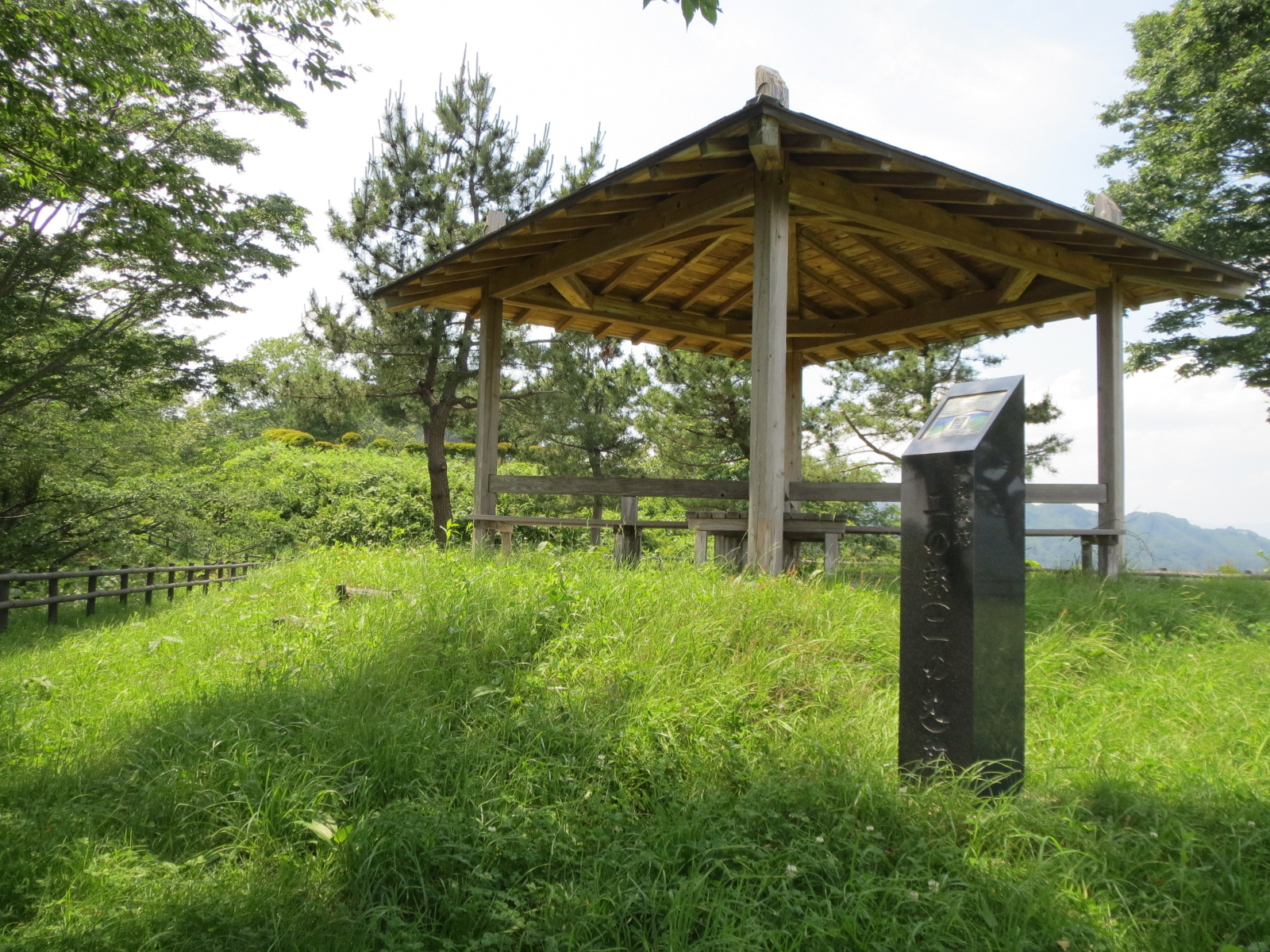 かつて大槌町にあった大槌城の二の郭（二の丸）跡。西には本丸跡が、東には三の郭（三の丸）跡がある。